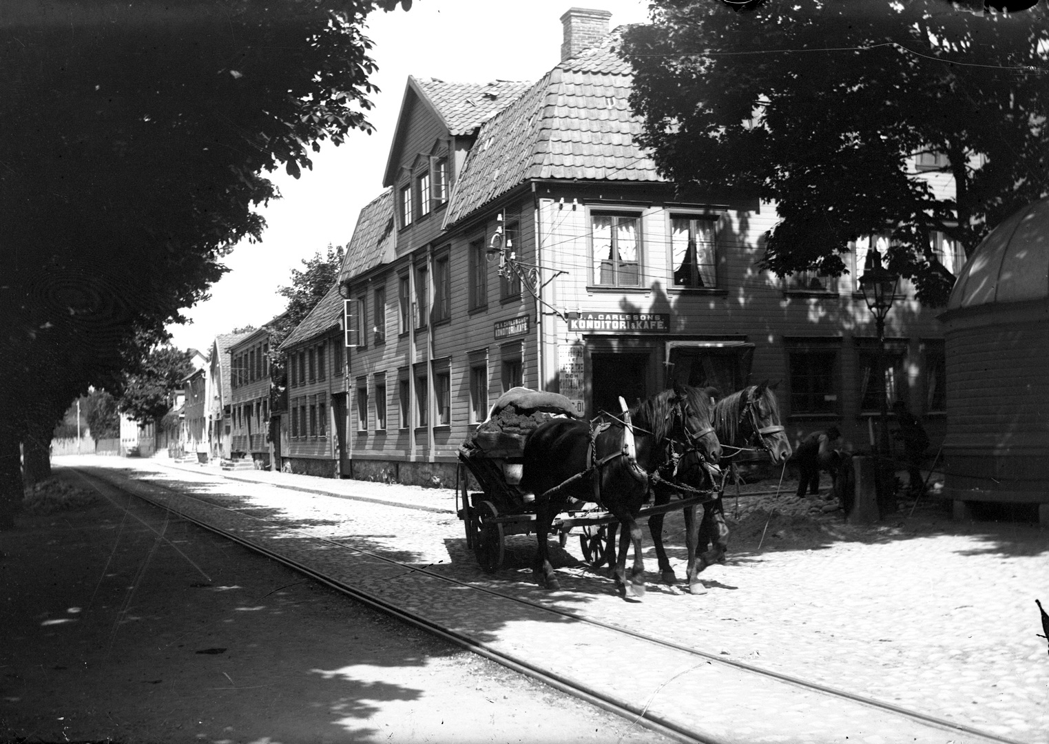 Fotografi på glasplåt över kvarteret Måns taget 1900-1915 från Strandgatan mot Måns 3.